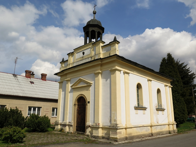 Kaple sv. Jana Nepomuckého (Horní Sukolom), náves, Horní Sukolom, Horní Sukolom.